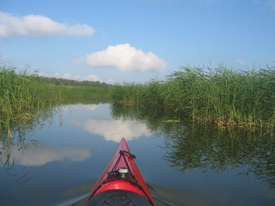 Näkymä Porvarinlahdelta loppukesällä 2004, kuvattu Helsinki Runtin aikana eli melonta Sipoo -Espoonlahden pohjukka. Kaislikon läpi kulki veneilyväylä pienestä Porvarinlahden lintutornin lähellä sijainneesta venesatamasta itään viralliselle 2,0 m veneilyväylälle. Nykyisin osa Helsinkiä, kuvan ottopaikka aikanaan oli Vantaan ja Helsingin rajoilla.